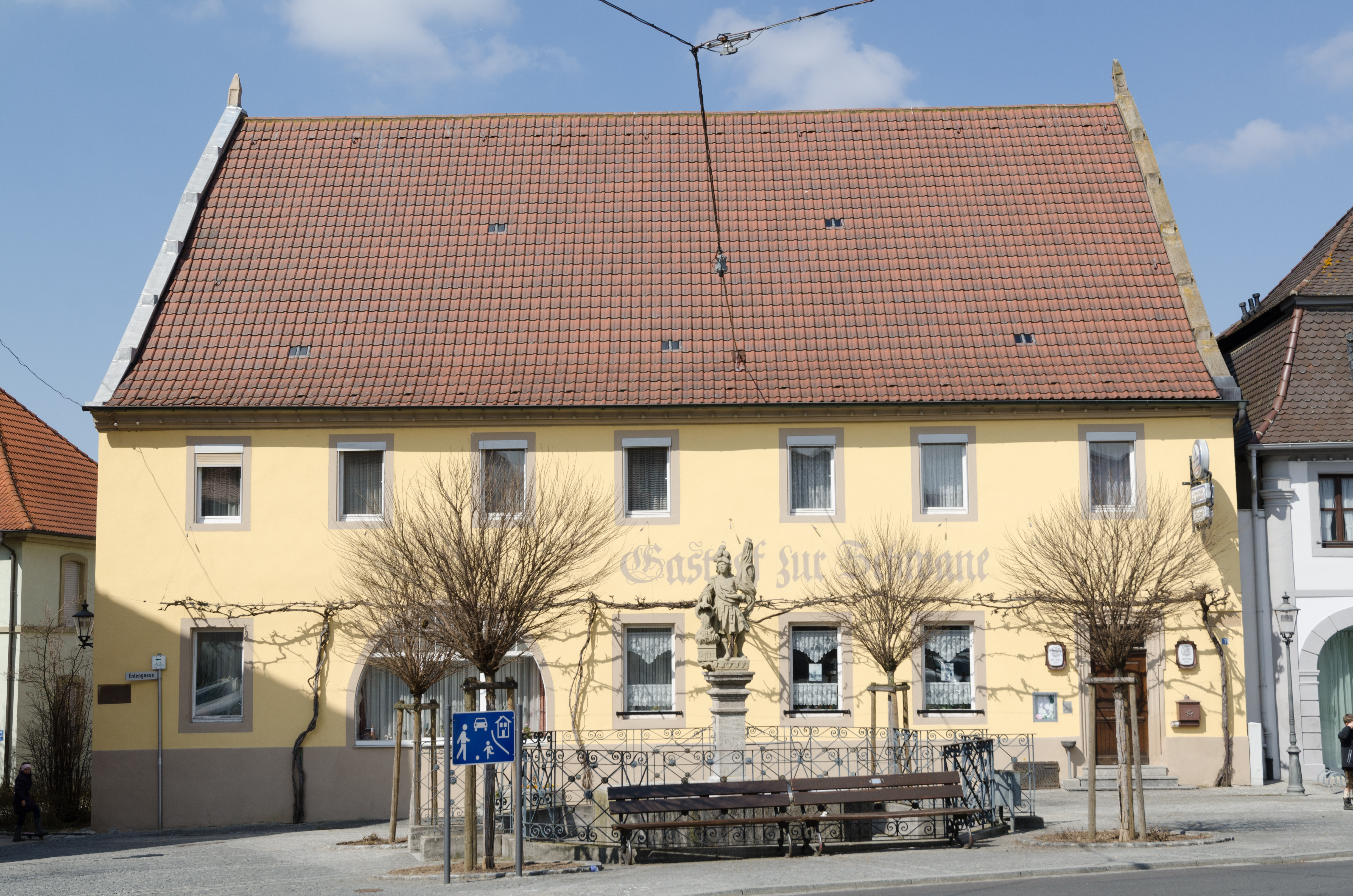 Gerolzhofen, Rügshöfer Straße 1